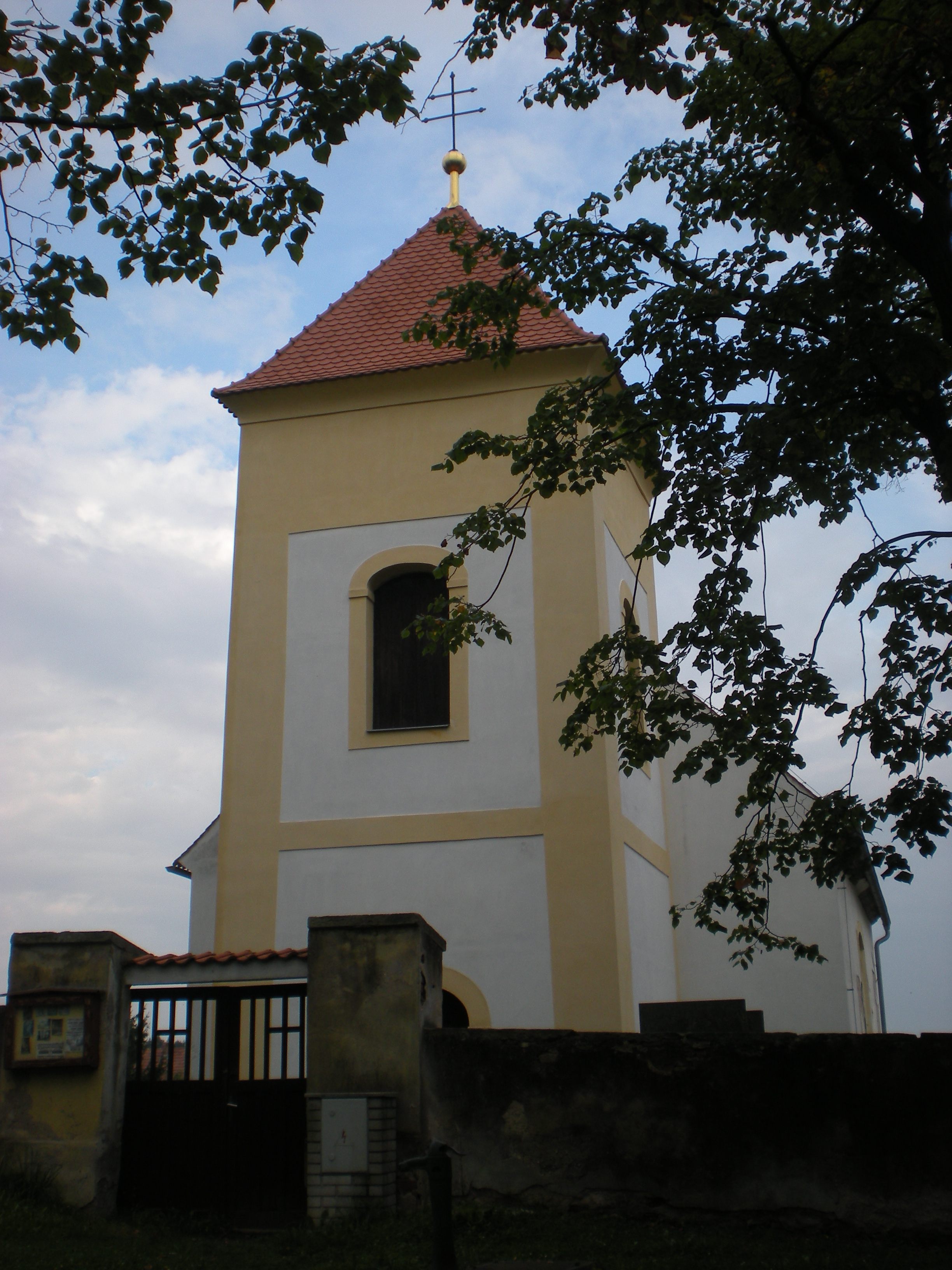 Kostel Všech svatých, Kozohlody.